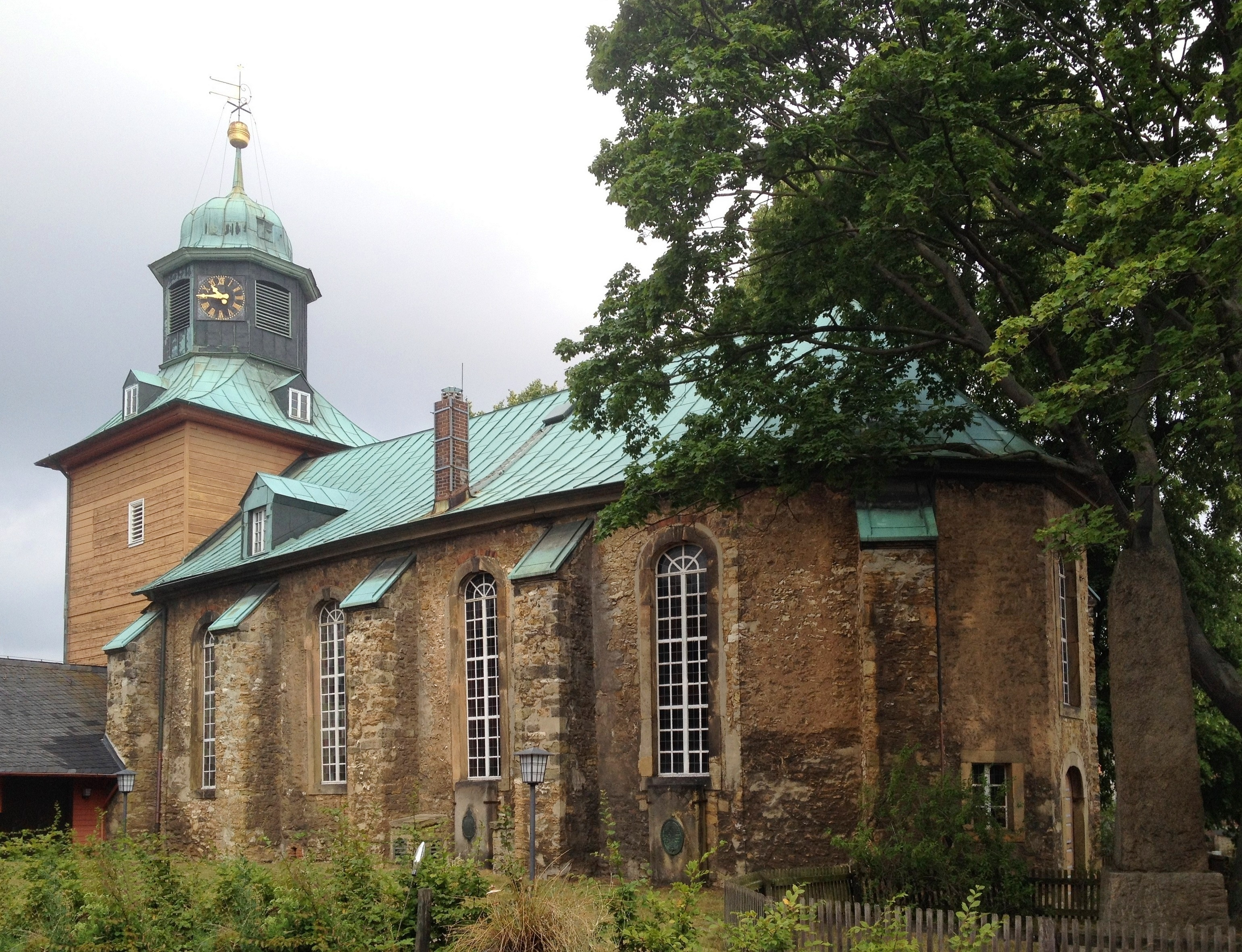 Harlingerode, Kirche